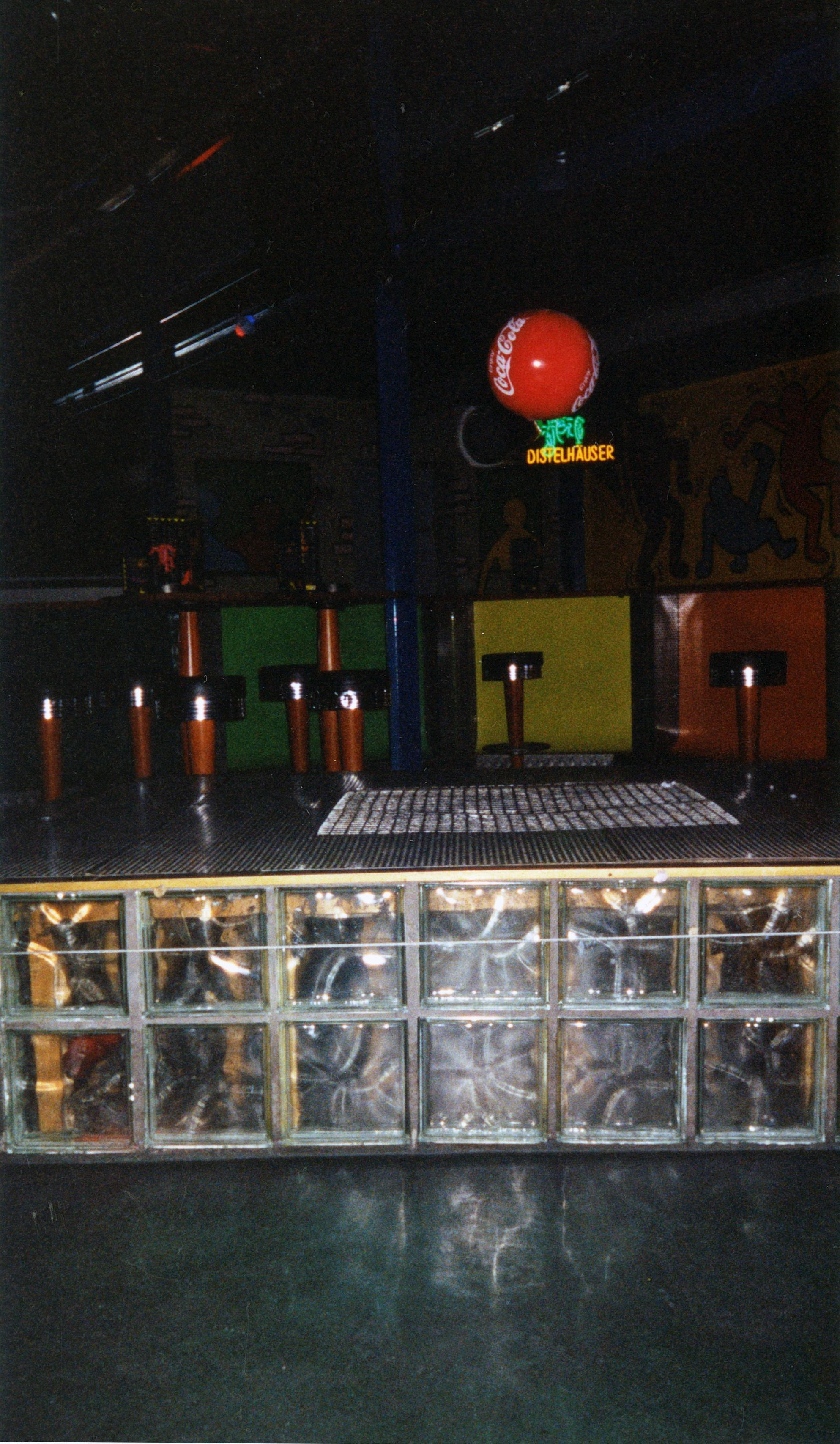 Ein leichter Ball schwebt im Luftstrom des Unterbodengebläses der Diskothek "La Boom" in Leingarten. - OpenStreetMap(Info)